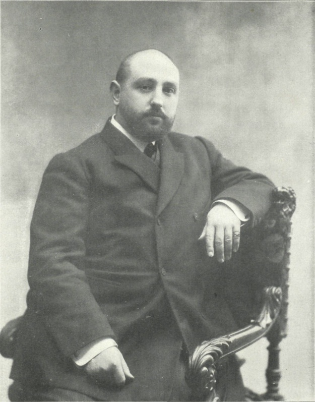 Fotografía de Ángel Ossorio y Gallardo realizada por Pablo Audouard